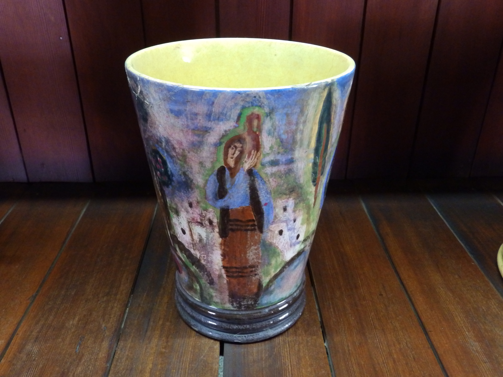 Κεραμεικός 1933